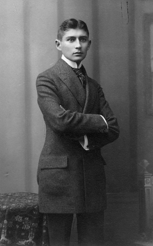 Franz Kafka (Fotografie aus dem Atelier Jacobi, 1906)